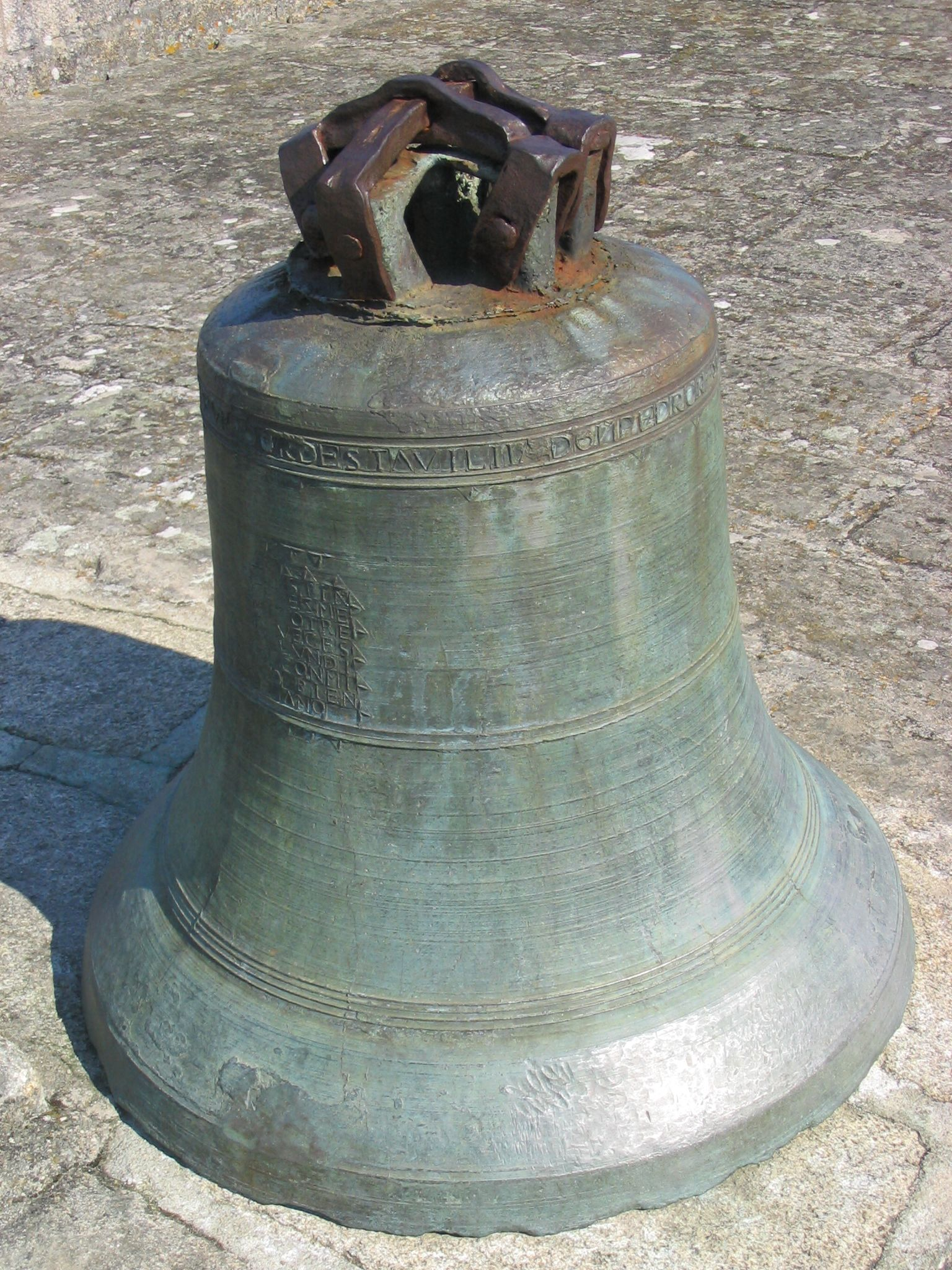 Campá na semana santa de Ourense